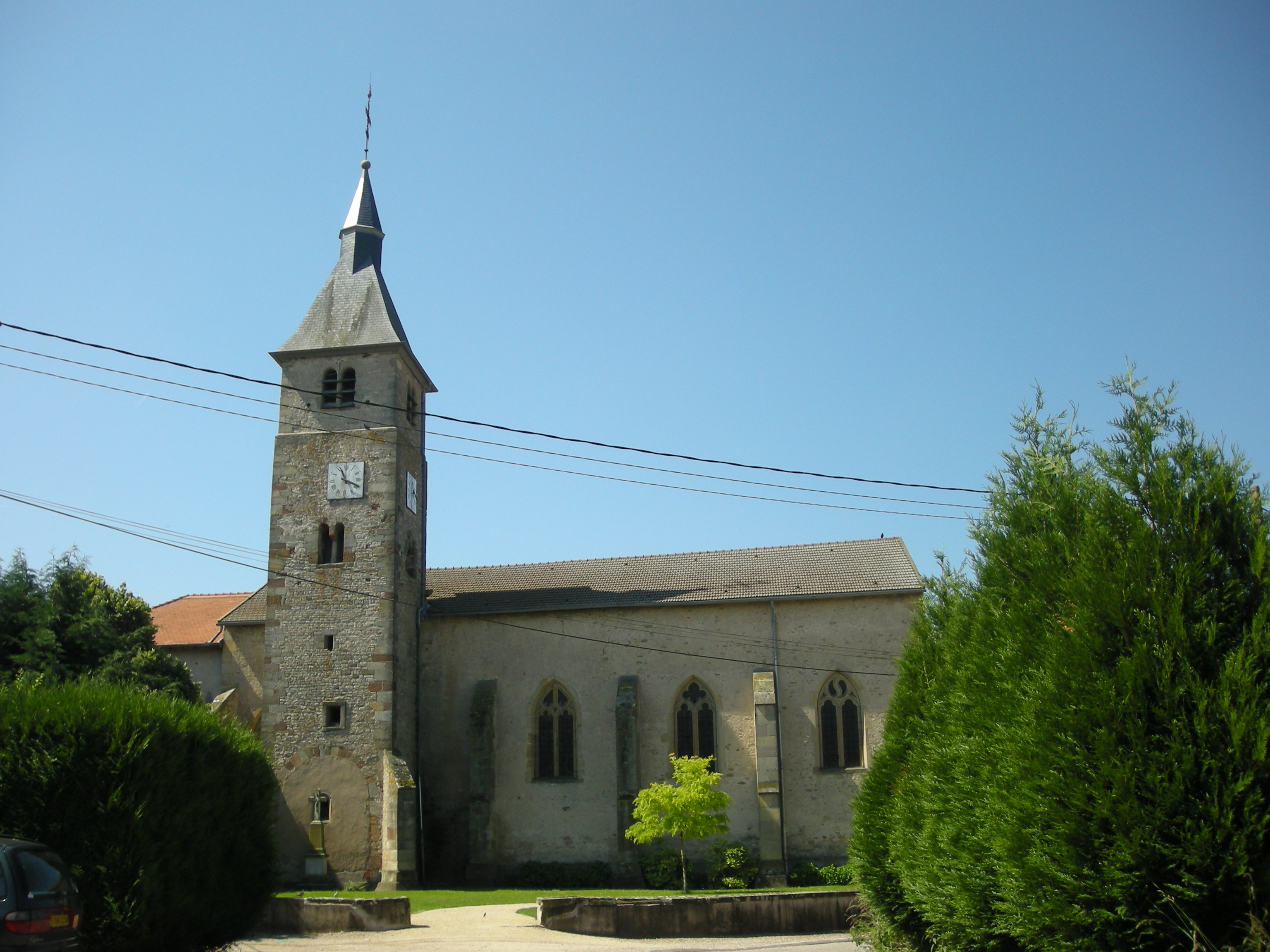 Eglise de Saint-Clément (Meurthe-et-Moselle)